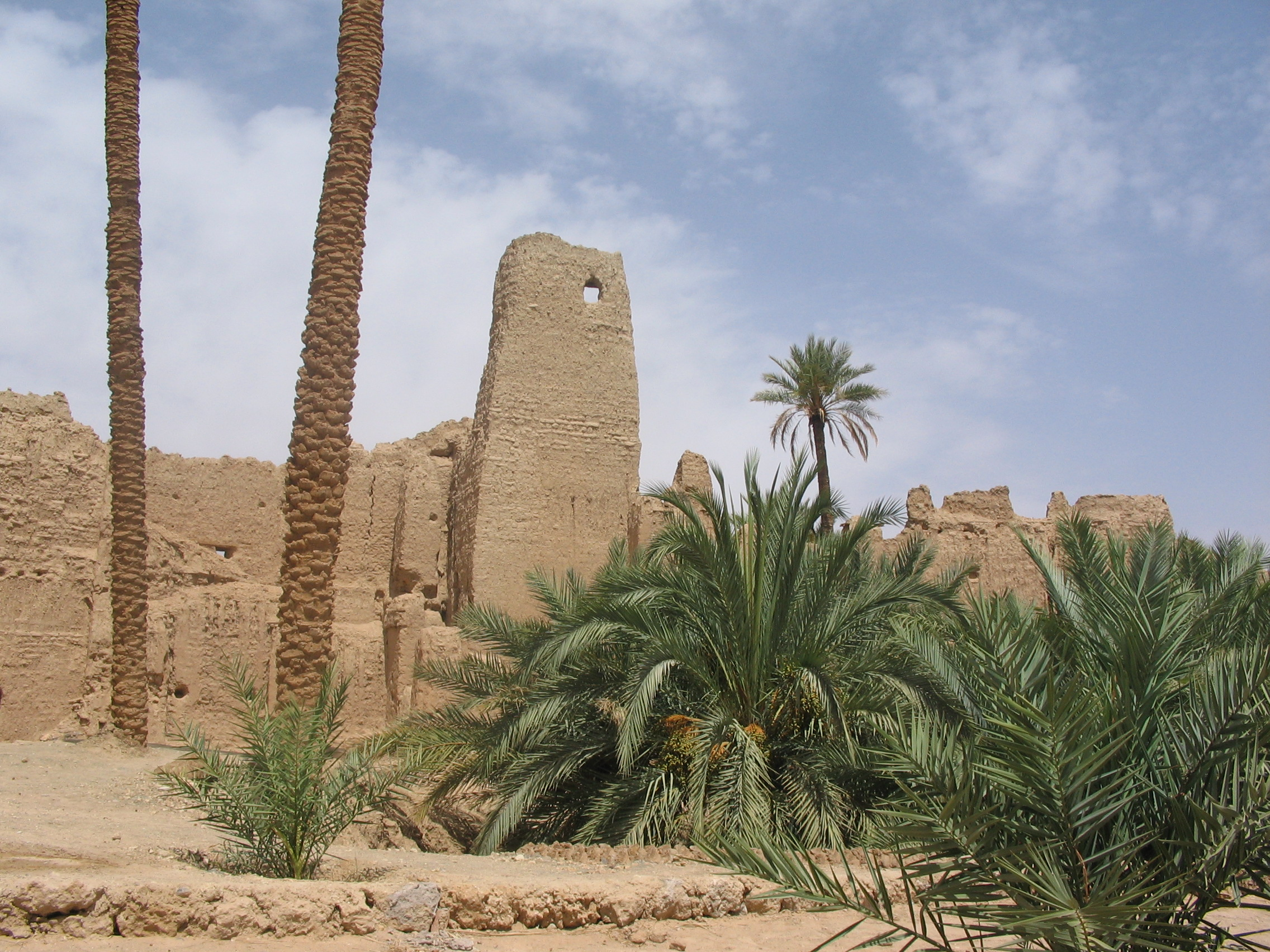 Figuig, Maroc